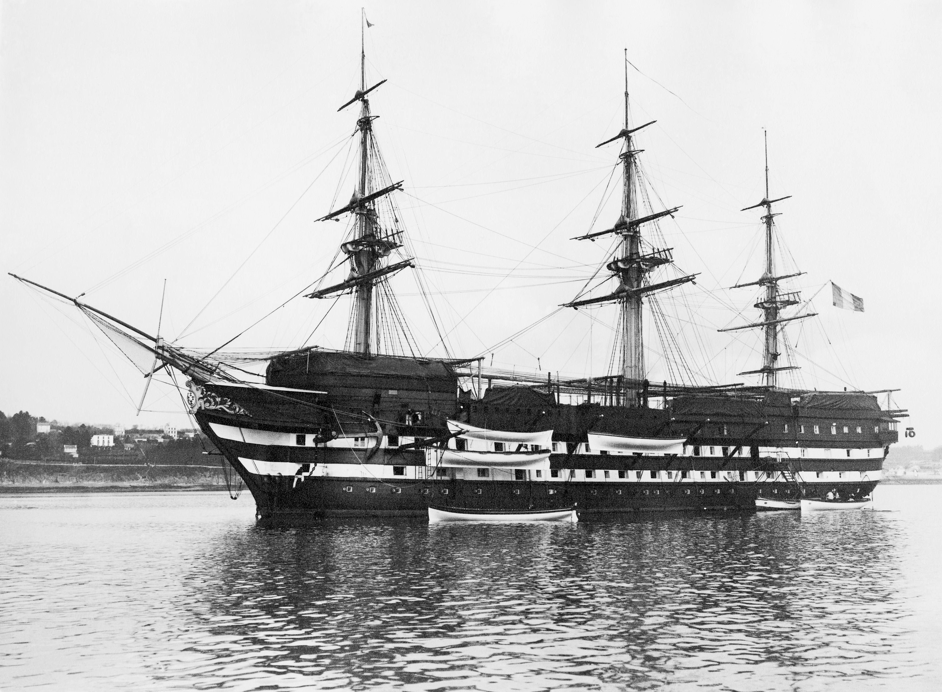 Le navire-école "Bretagne" (ex Fontenoy) en rade.